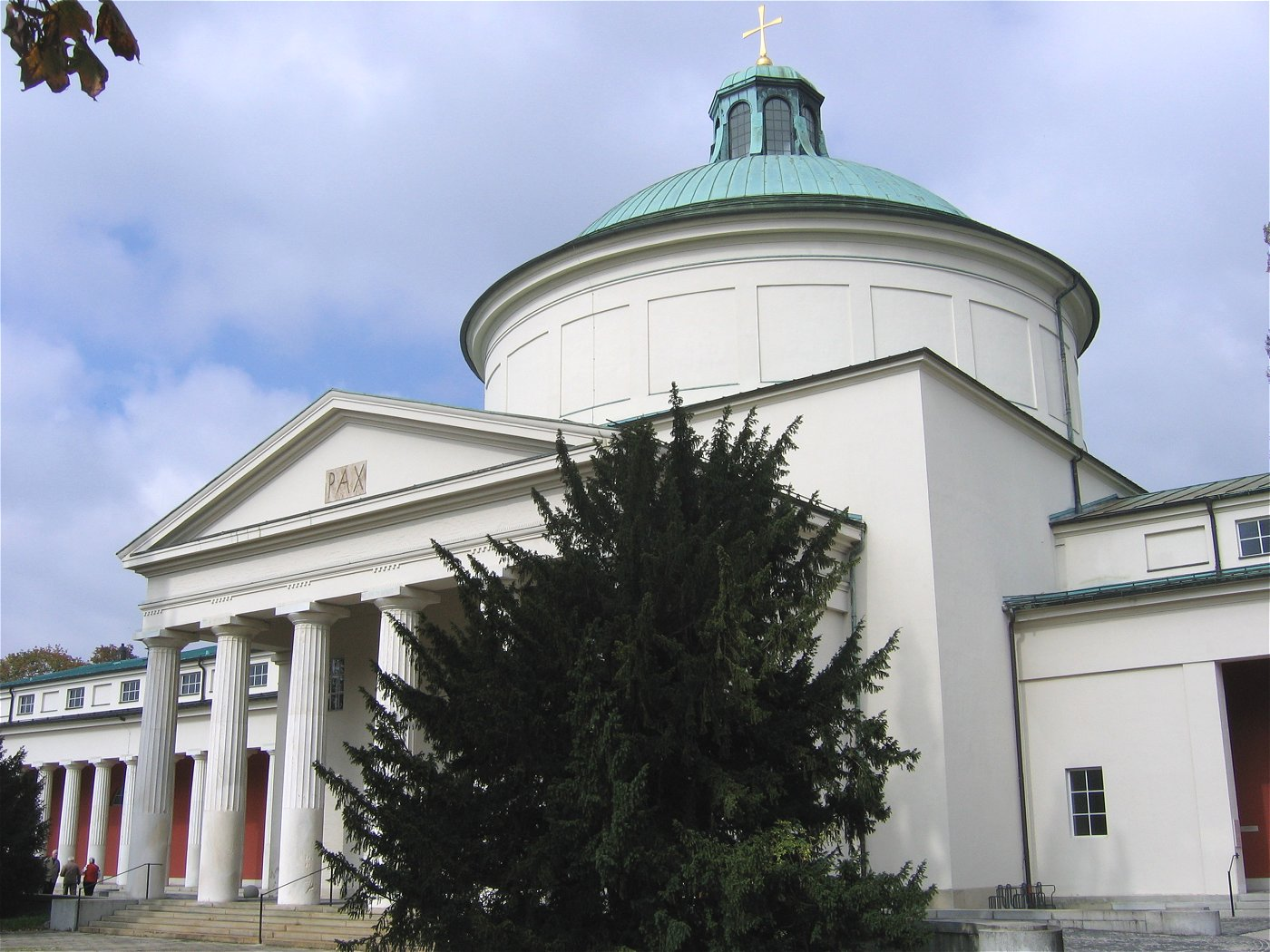 Ostfriedhof in München